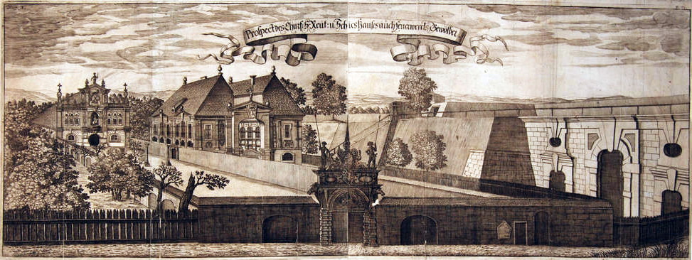 Darstellung des Reithauses und des Schießhauses (auch Feuerwerksgewölbe) am Zwingerwall westlich des Residenzschlosses, 1673 gebaut, 1710 für Zwinger abgerissen, Blatt aus Weckschen Chronik von 1679/80